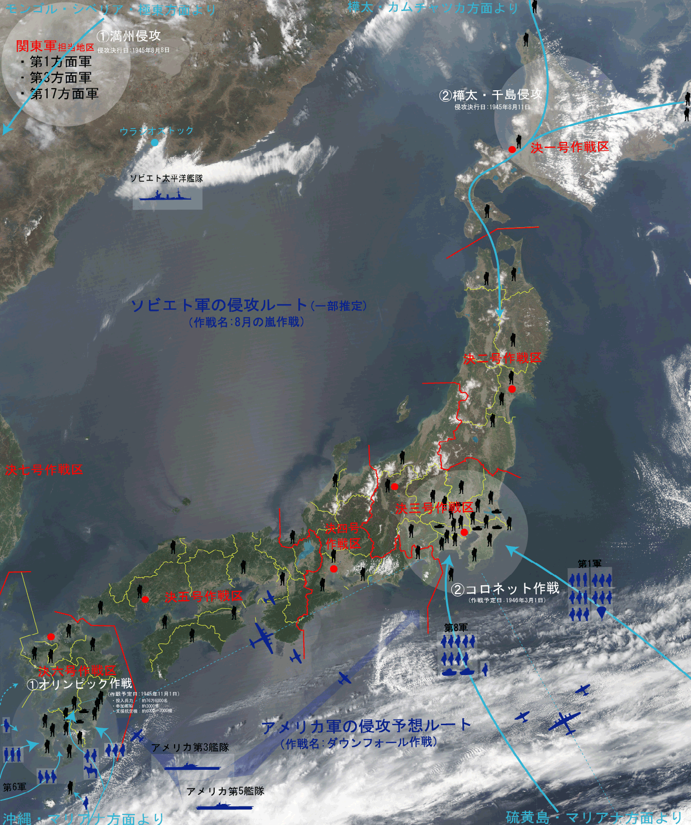 連合軍と日本軍の日本本土決戦の計画をまとめた概略図